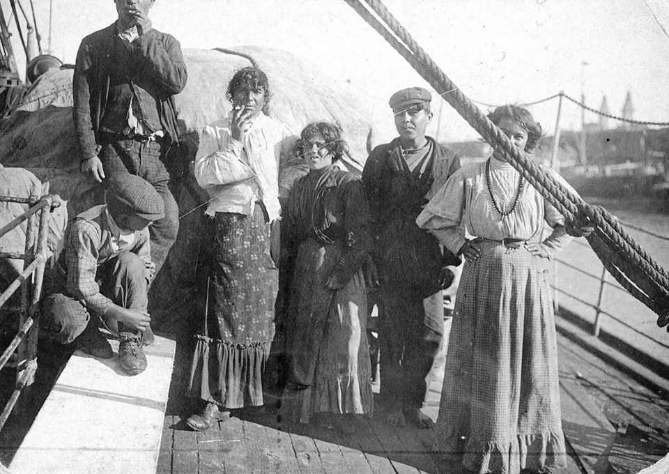 Gitanos - considerados inmigrantes ilegales - en el puerto de Buenos Aires, a bordo del Re Umberto, 1919.